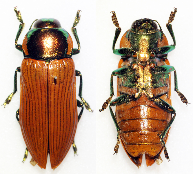 Buprestidae - In collection